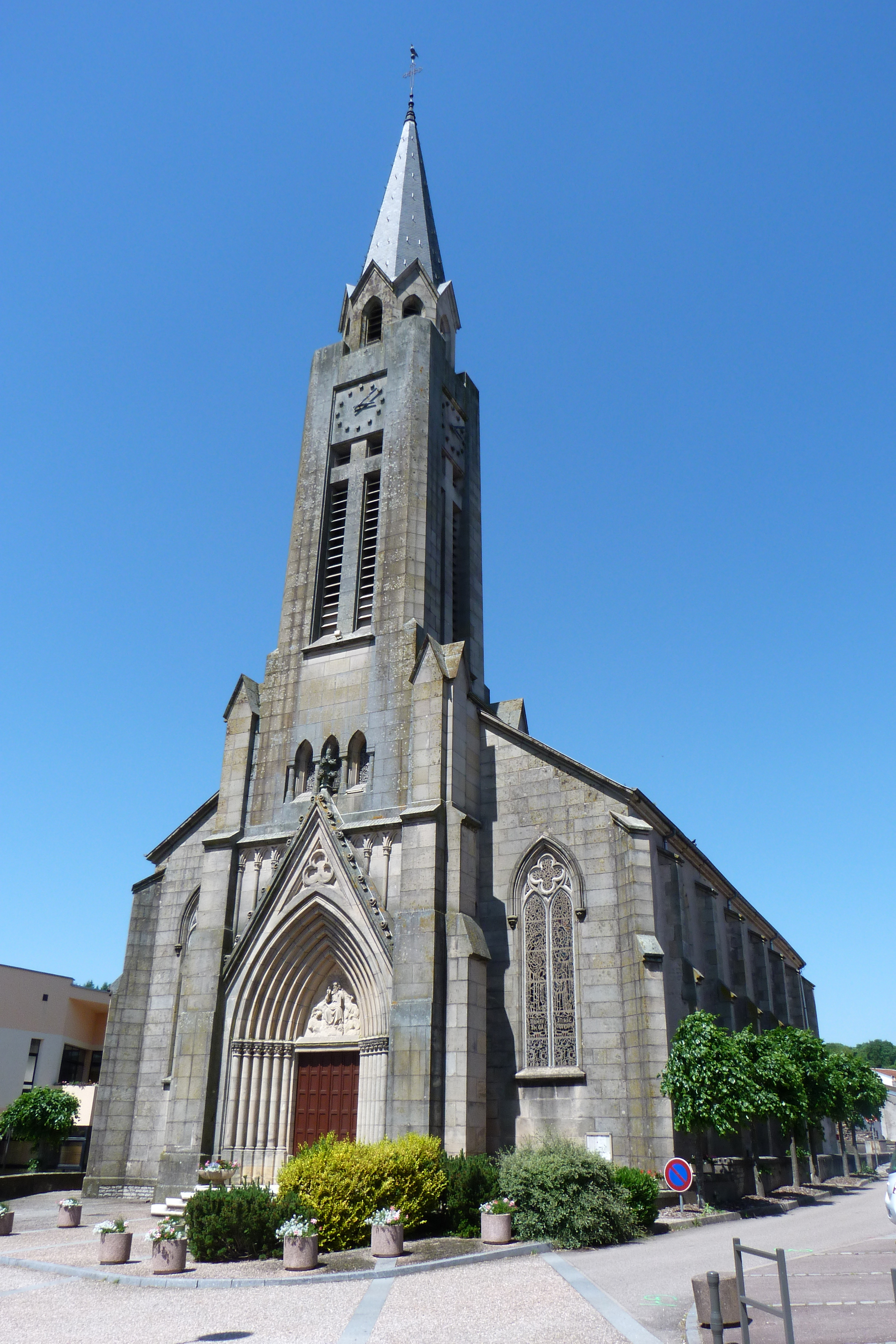 Église Saint-Étienne de Dogneville, Vosges.